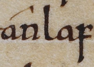 The name of Olaf Gothfrithson (died 941) as it appears on folio 141v of British Library Cotton MS Tiberius B I (the "C" version of the Anglo-Saxon Chronicle): "Ánlaf".